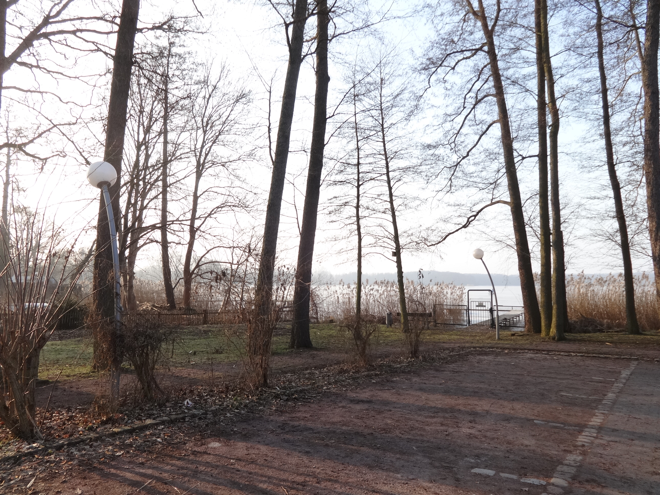 Fontane-Park in Teupitz, Landkreis Dahme-Spreewald in Brandenburg. Eröffnet im Jahr 1928 zum 30. Todestag des Schriftstellers Theodor Fontane.